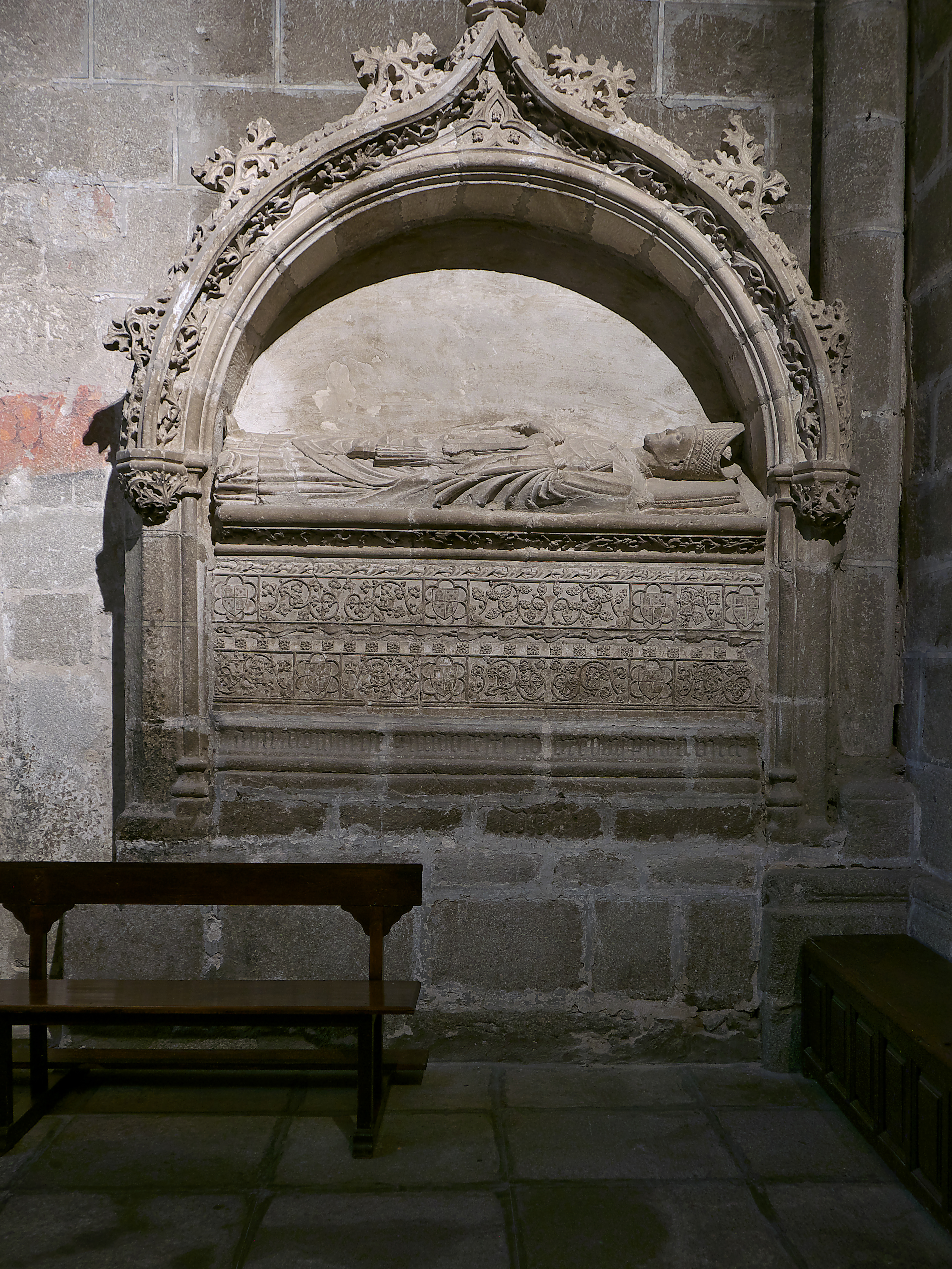 Capilla de San Ildefonso (Catedral de Ávila). Sepulcro de Alonso II, obispo de Ávila (†1378).